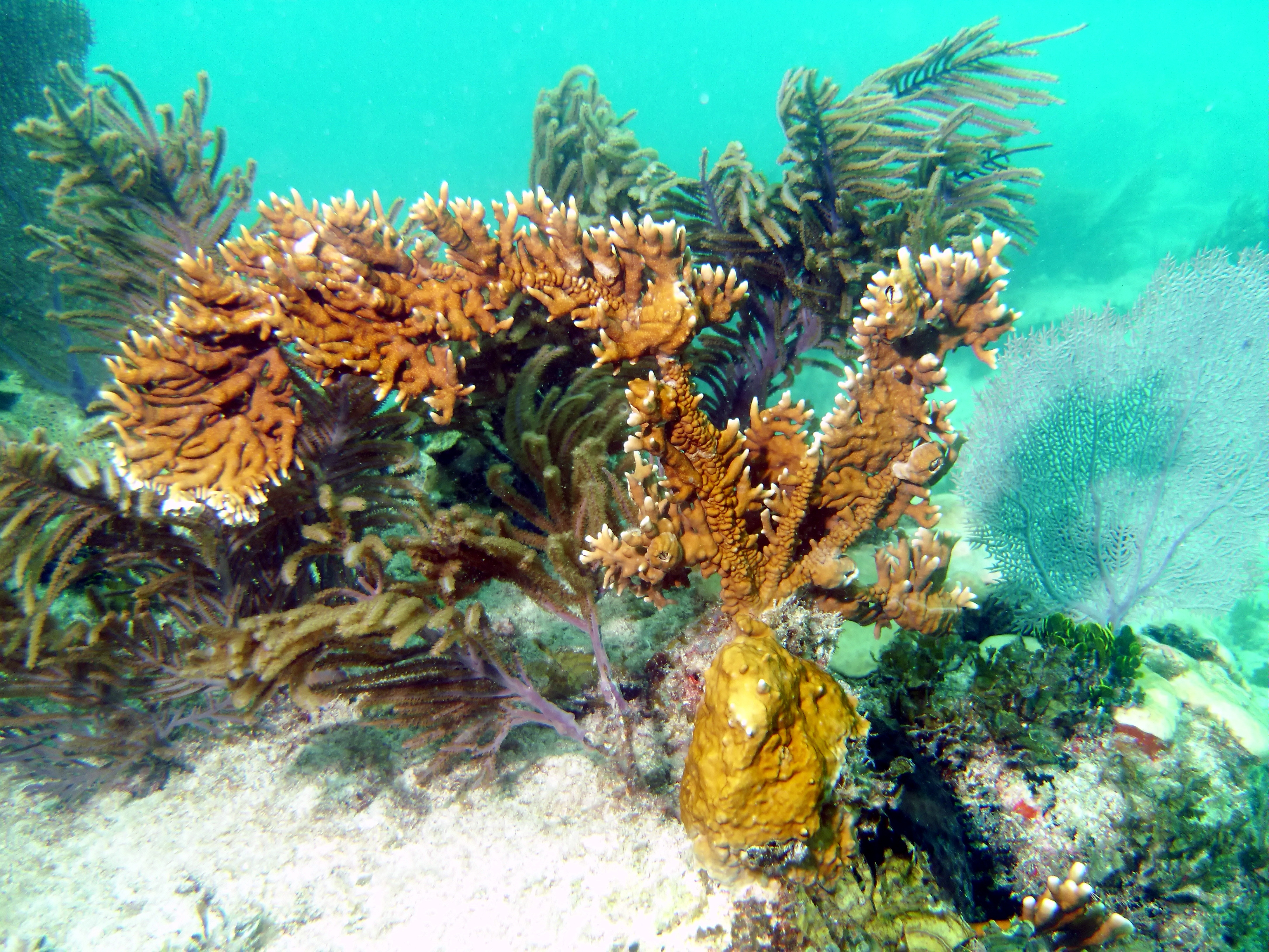 Millepora incrustante en gorgonia, Cayo Largo, Florida, EE.UU. 2011